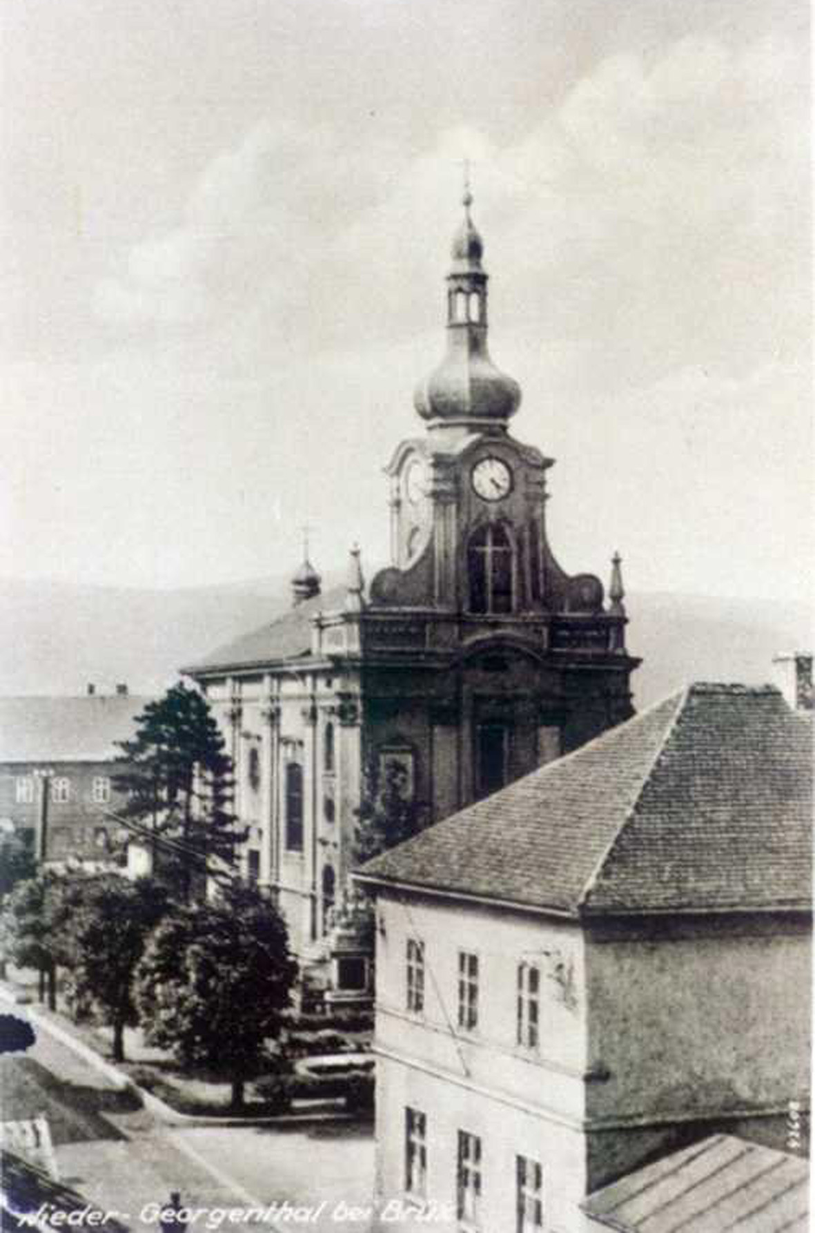 Pfarrkirche der ehemaligen Gemeinde Dolní Jiřetín (Niedergeorgenthal) bei Most (Brüx) in Tschechien. Die Kirche wurde 1898/99 nach Abriss der alten Kirche erbaut, Architekt: Max von Loos. Es besteht eine stilistische Ähnlichkeit zur Dreifaltigkeitskirche in Ústí-Střekov, vgl. z. B. die Pilaster am Kirchenschiff.